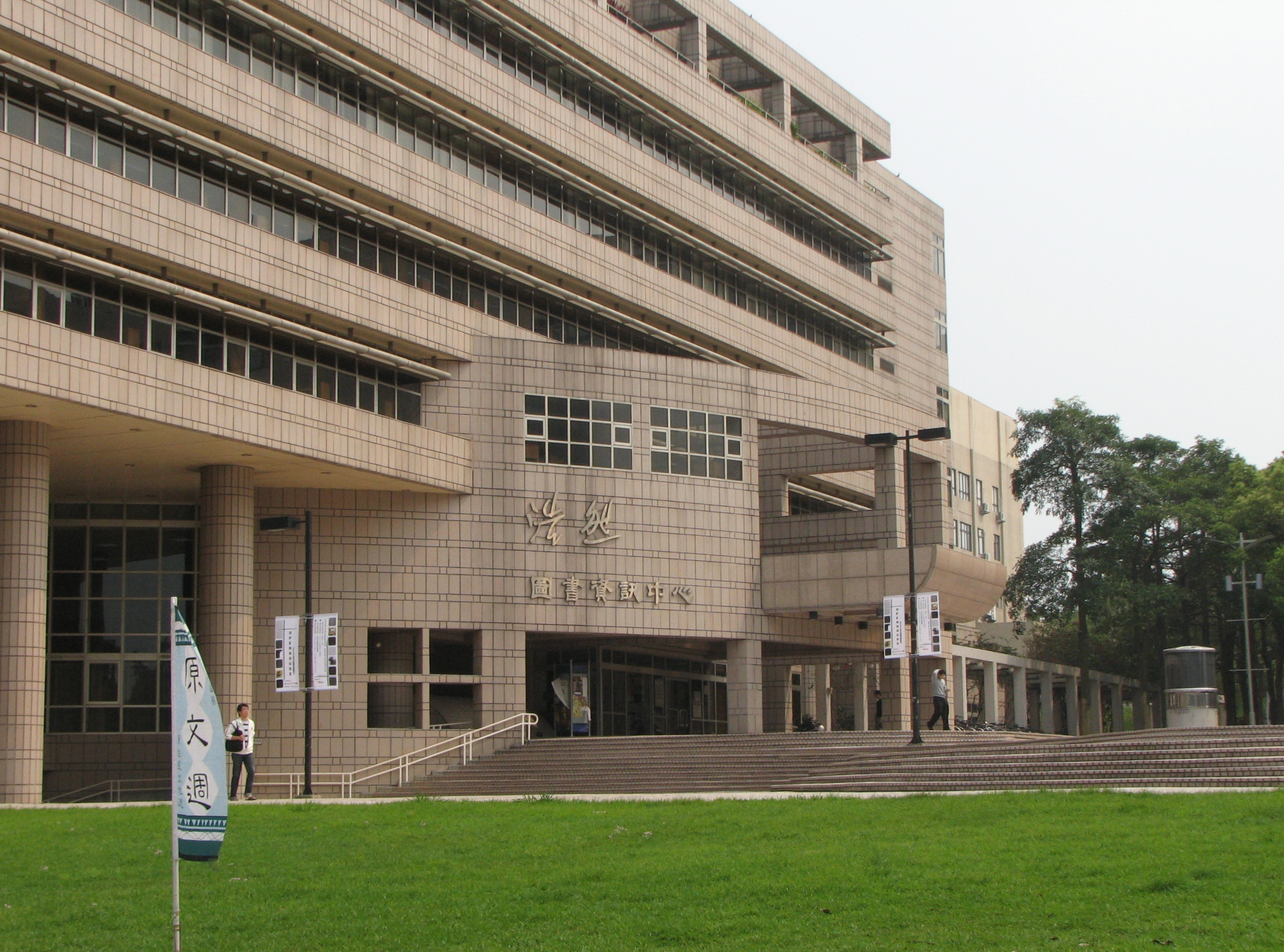 Hao Ran Library (浩然圖書館) in National Chiao Tung Univ, HsinChu, Taiwan